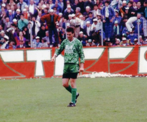 Pita em gramados Italianos